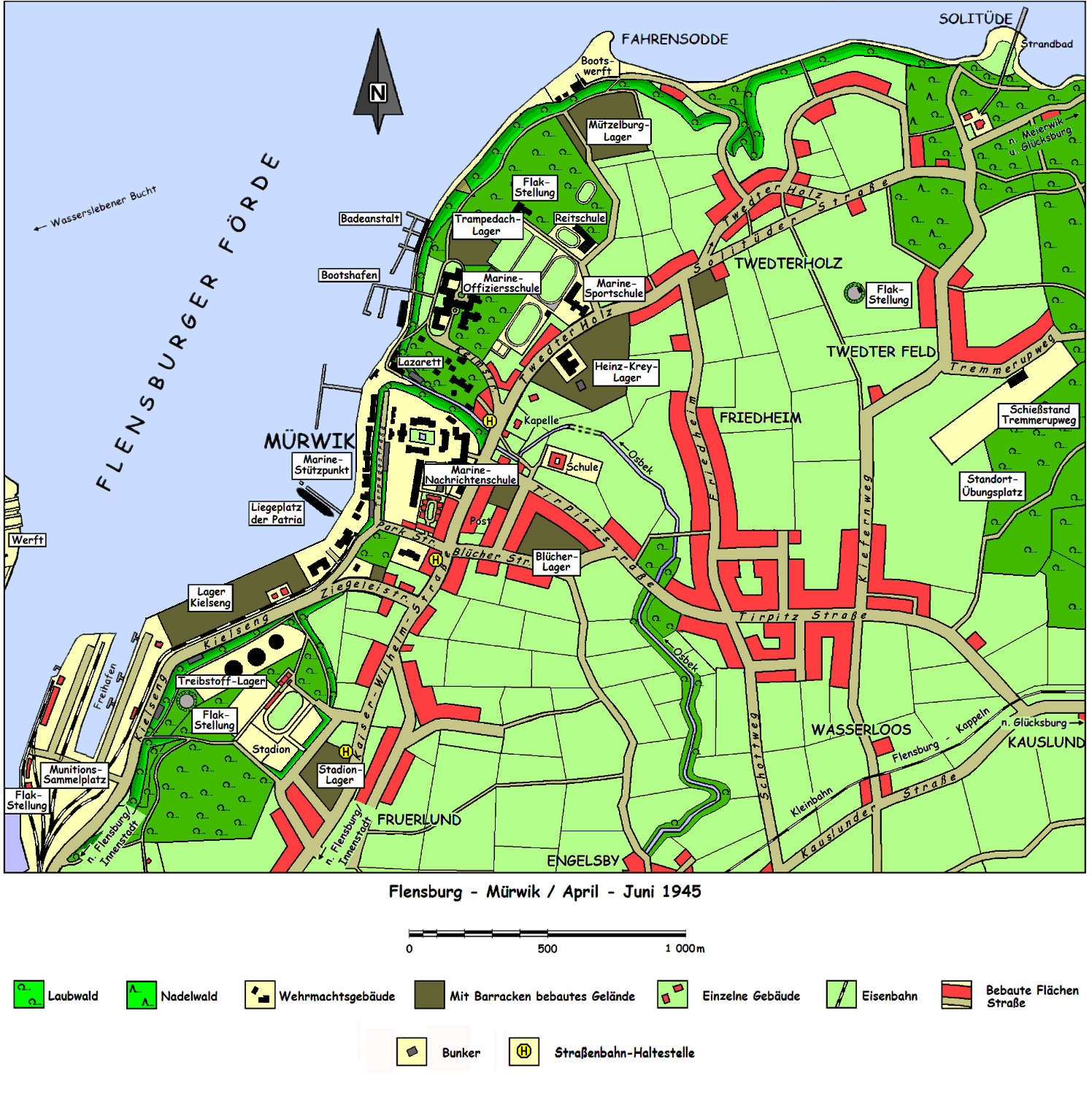 Karte des Flensburger Stadtteils Mürwik in der Situation des Frühjahrs 1945. Es sind alle für die geschichtlichen Ereignisse relevanten Plätze und Orte eingezeichnet.